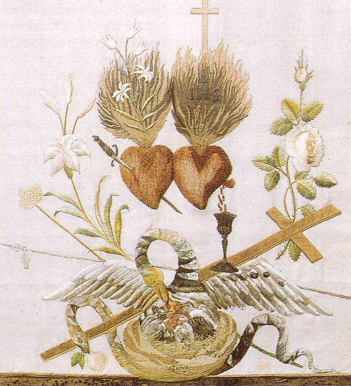 Madeleine-Sophie Barat Broderie brodée à Paris par Madeleine-Sophie et envoyée à sa mère